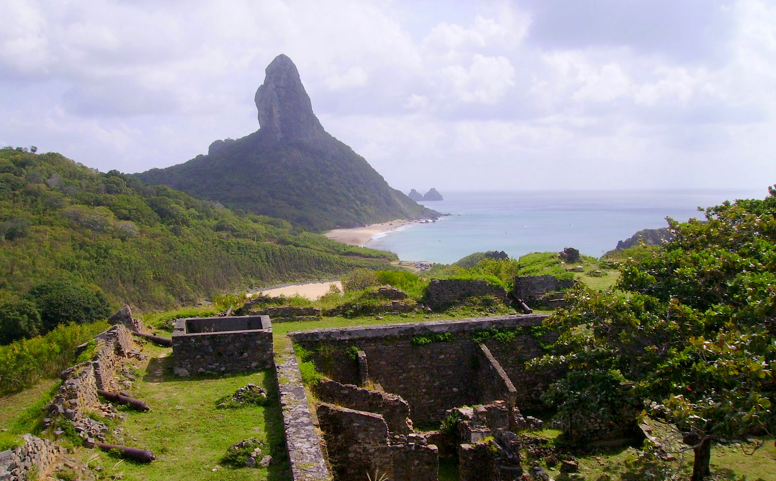 Forte dos remédios